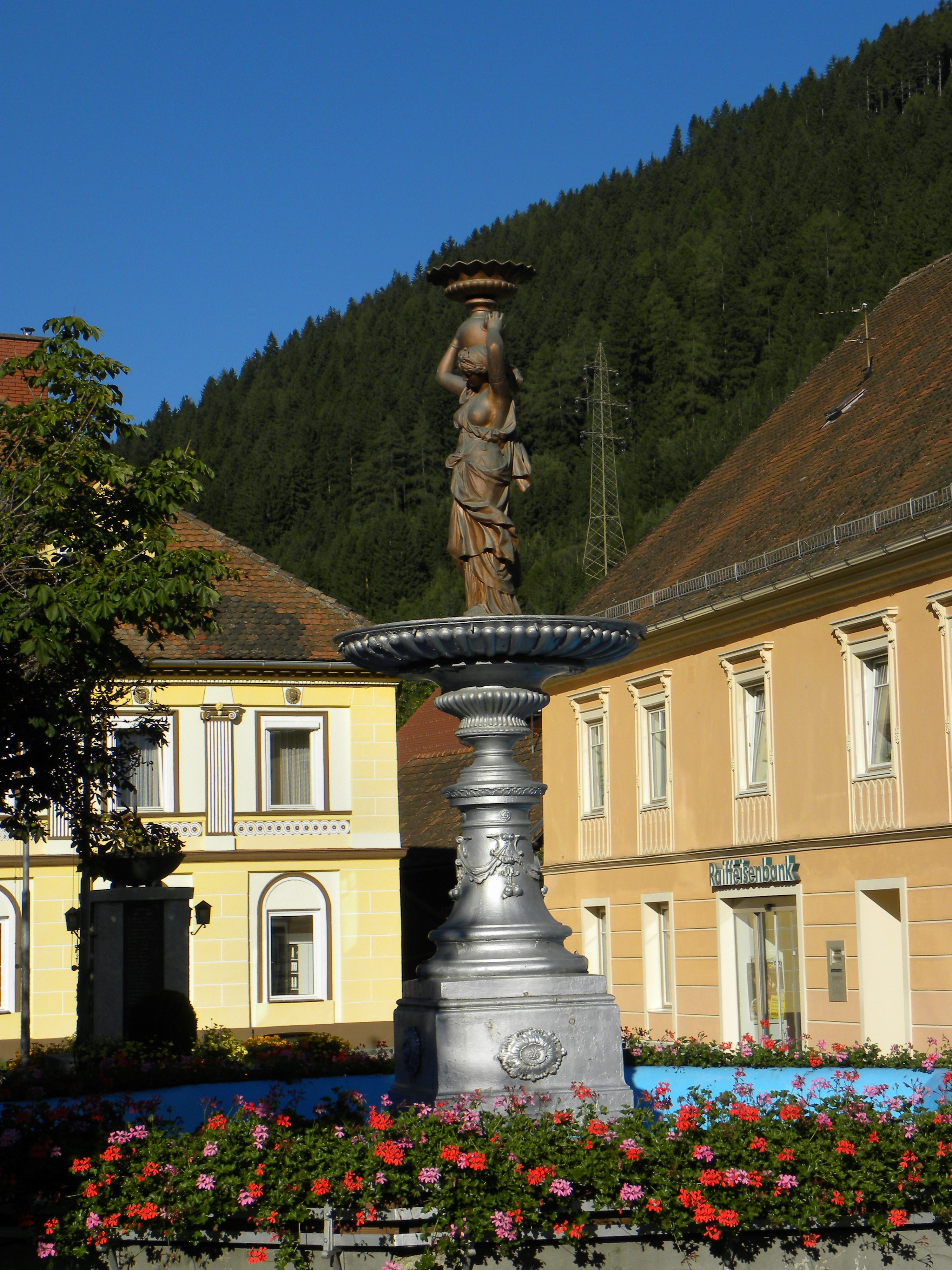 Brunnen